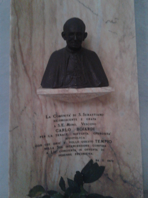 Chiesa di San Sebastiano, Massa. Navata destra, monumento al vescovo Carlo Boiardi